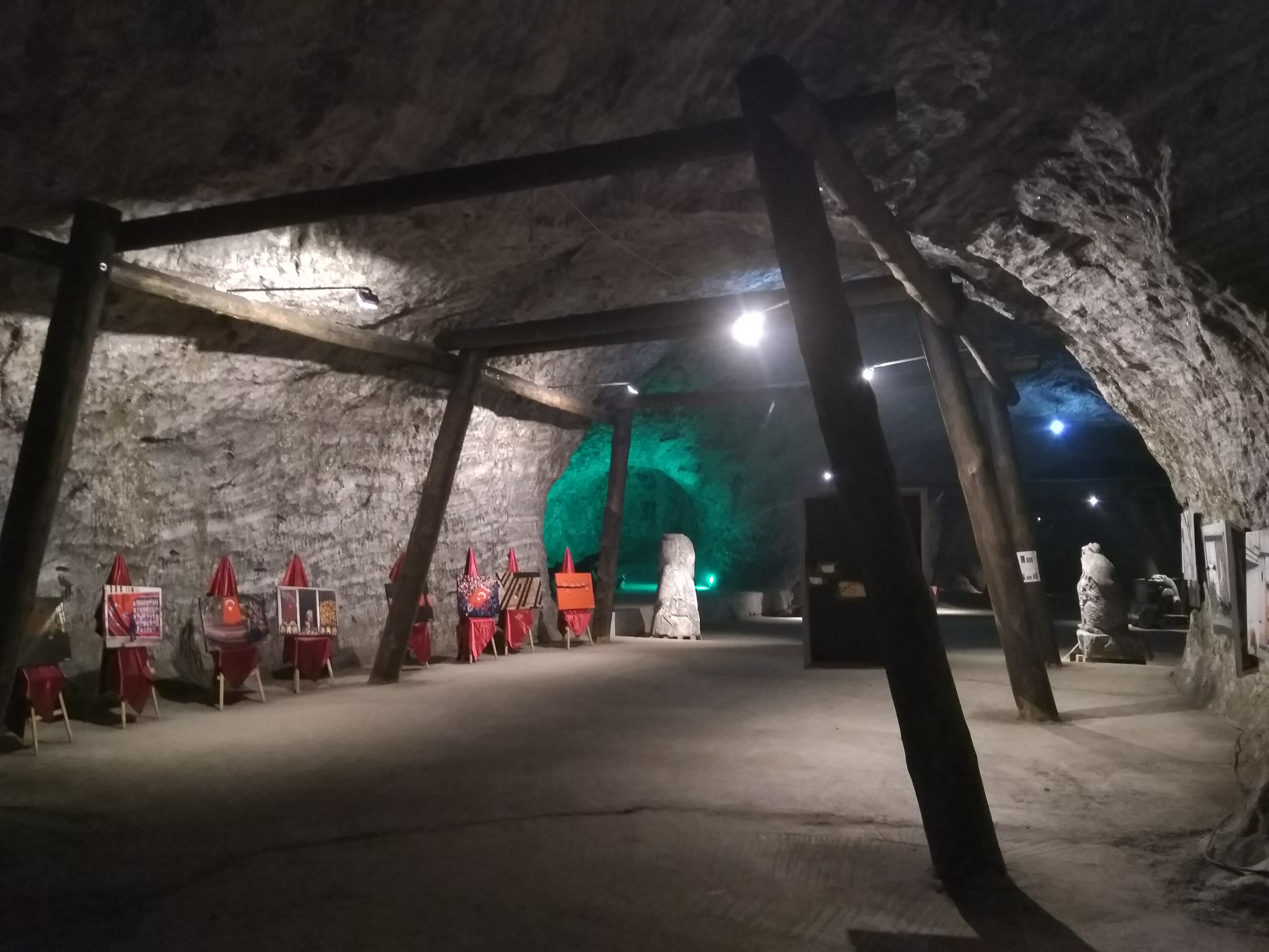 Çankırı'daki Tuz Mağarası'nın içerisindeki bir sergiden görünüm.